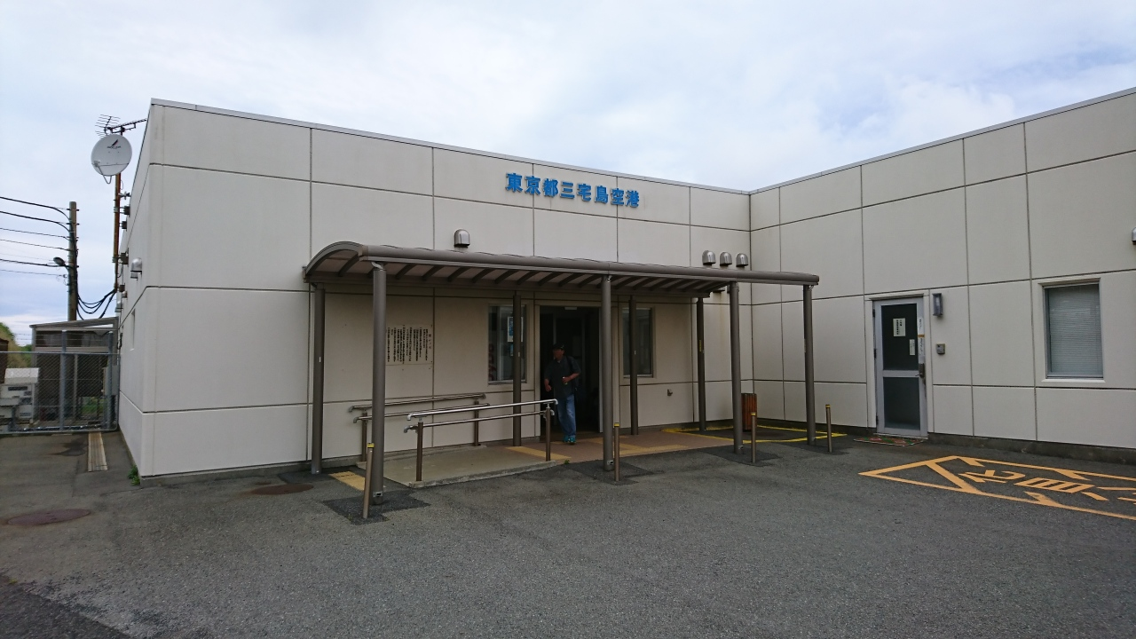 三宅島空港ターミナル